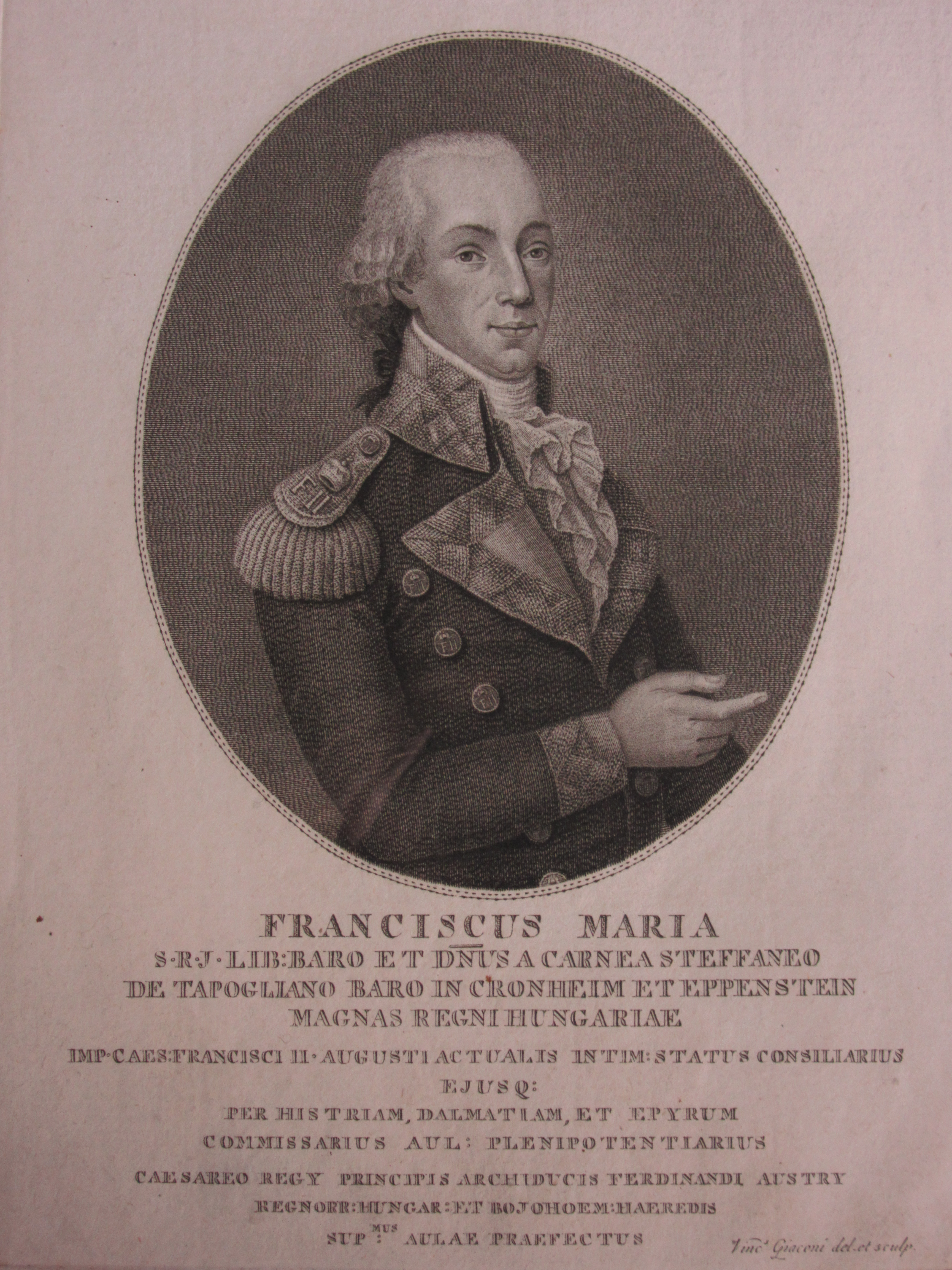 Franz Maria von Carnea Steffaneo